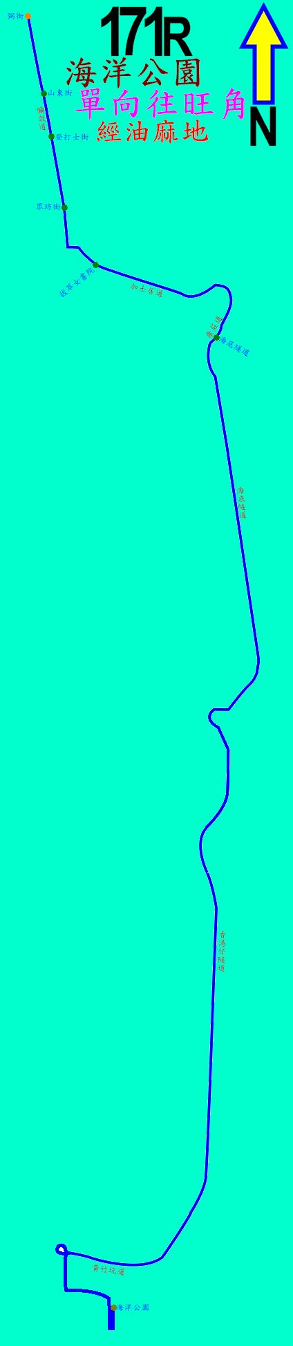 中文（香港）: 過海隧巴171R線的走線圖